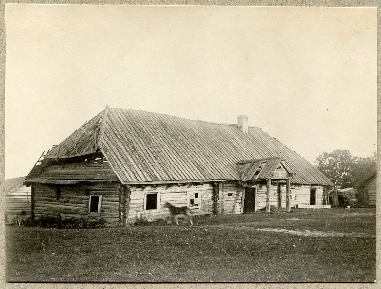 Беларуская (тарашкевіца): Бахаравічы (Bacharavičy), дряўляная хата (старая сядзіба?)